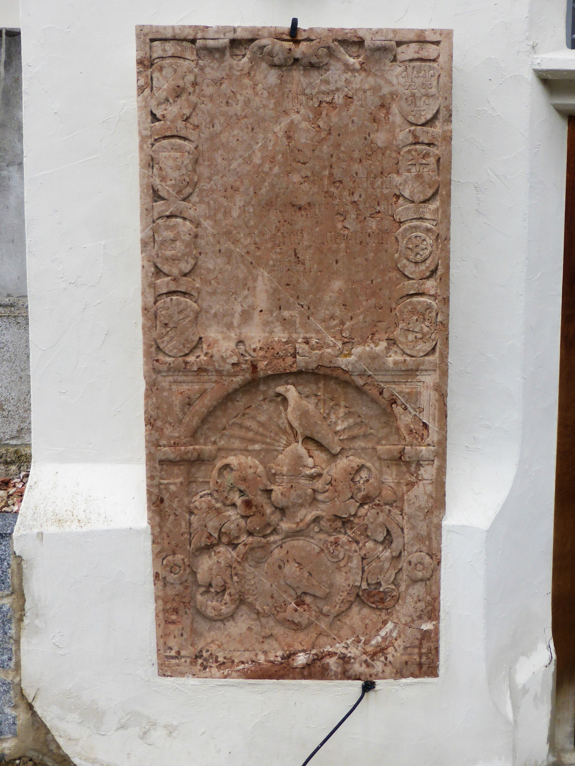 Epitaph der Paumgartner, Besitzer von Schloss Stubenberg